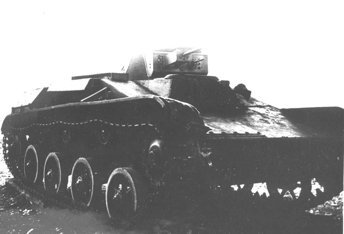 Танк Т-60 "Малютка" на котором воевала Екатерина Алексеевна Петлюк